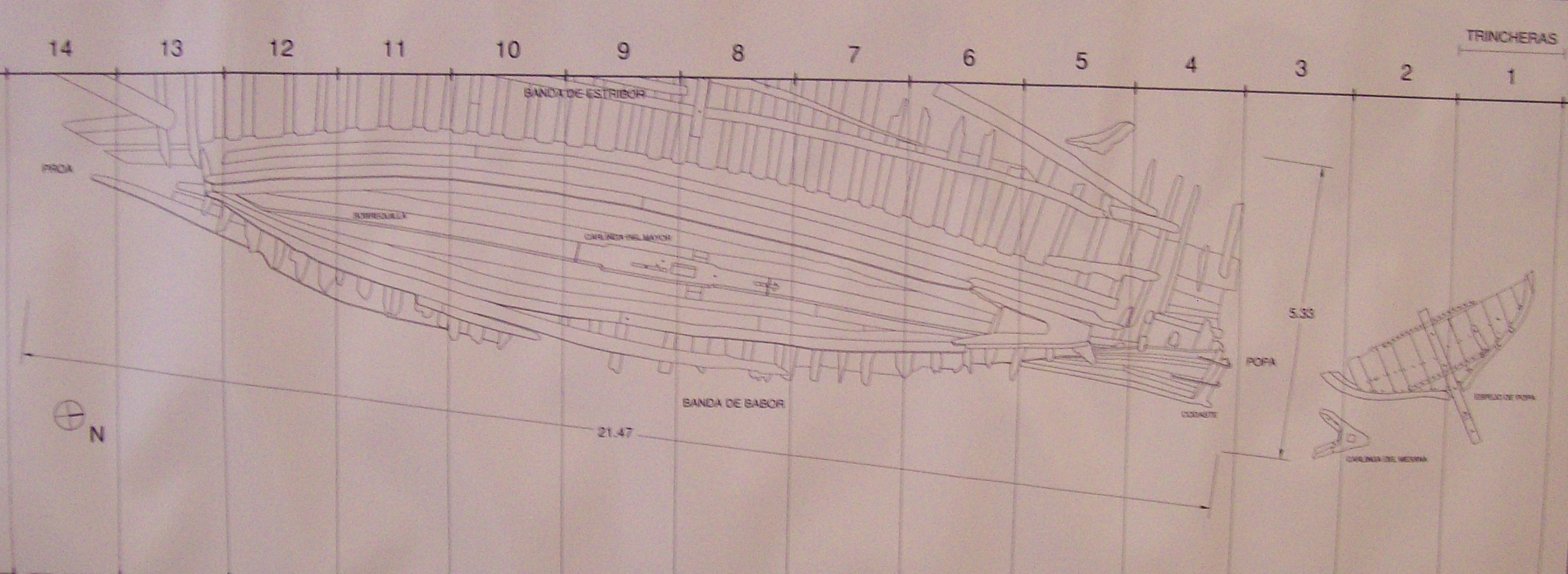 Plano que muestra la posición en que fue encontrado el denominado "Pecio ZenCity", barco mercante español del siglo XVIII que se hundió en el Río de la Plata, Buenos Aires, Argentina.